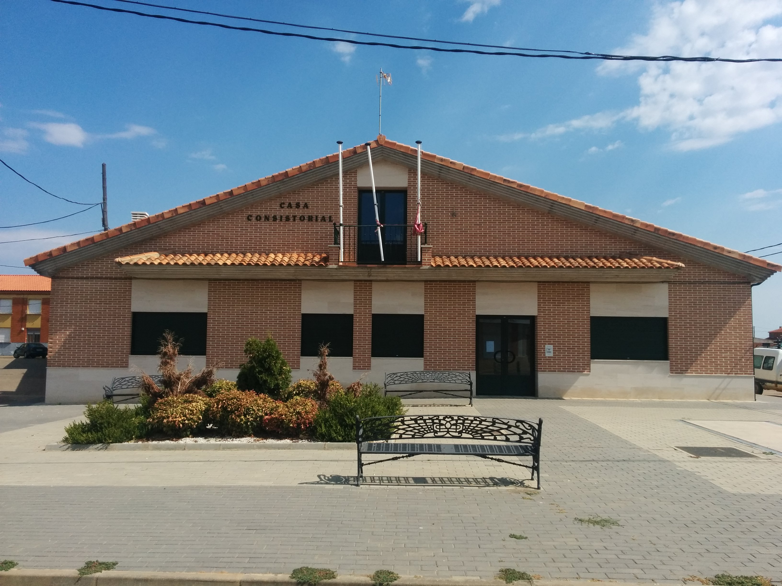 Casa consistorial de Roperuelos del Páramo